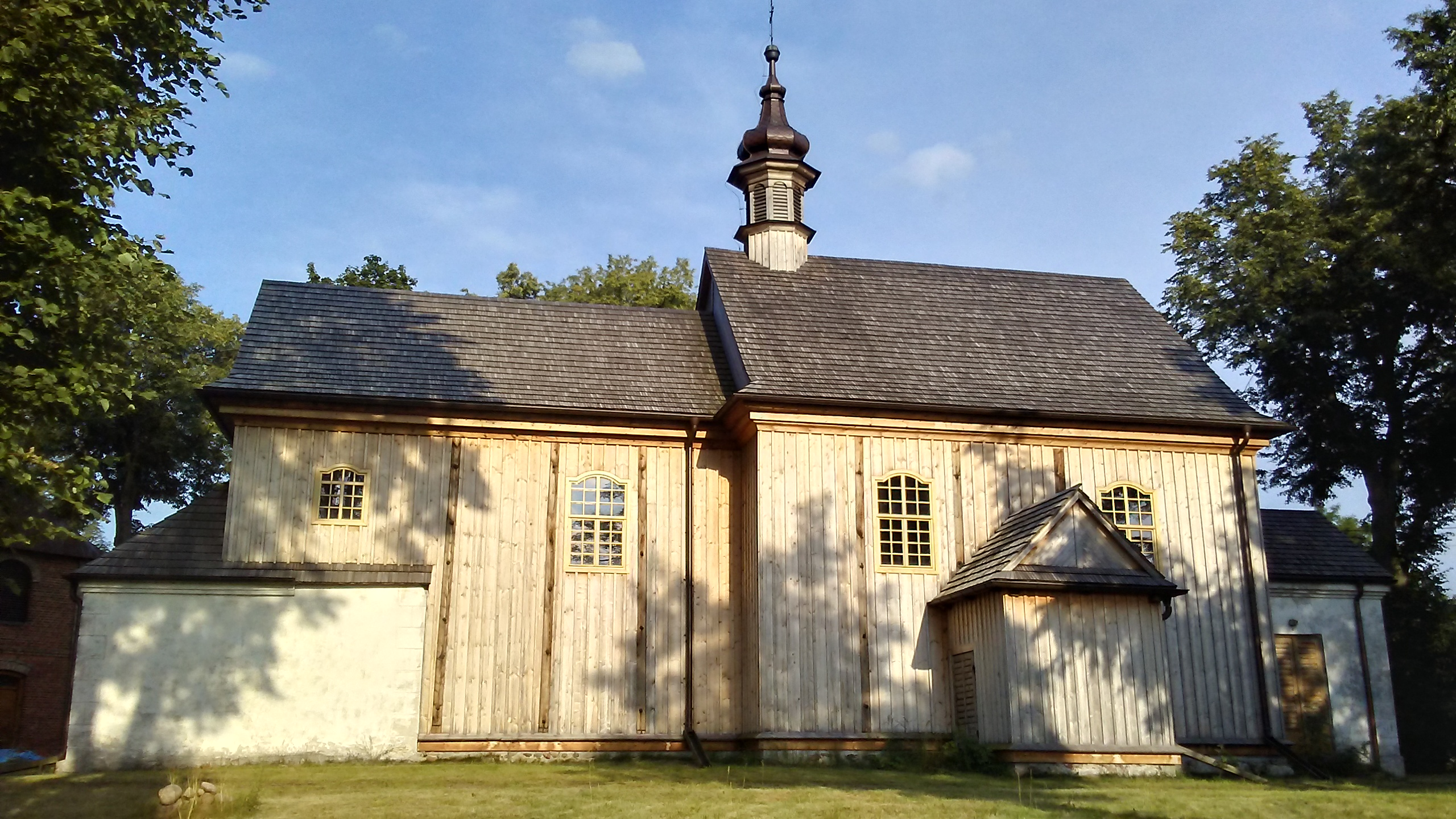 Kościół pw. św. Marcina na Białobrzegach w Tomaszowie Mazowieckim